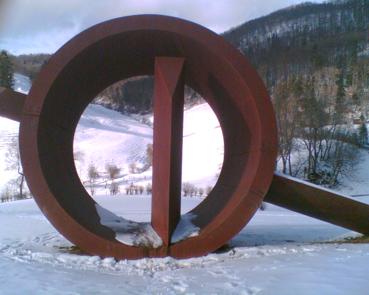 Nigel Hall, Soglio, 1994 - in der Stiftung sculpture at schoenthal